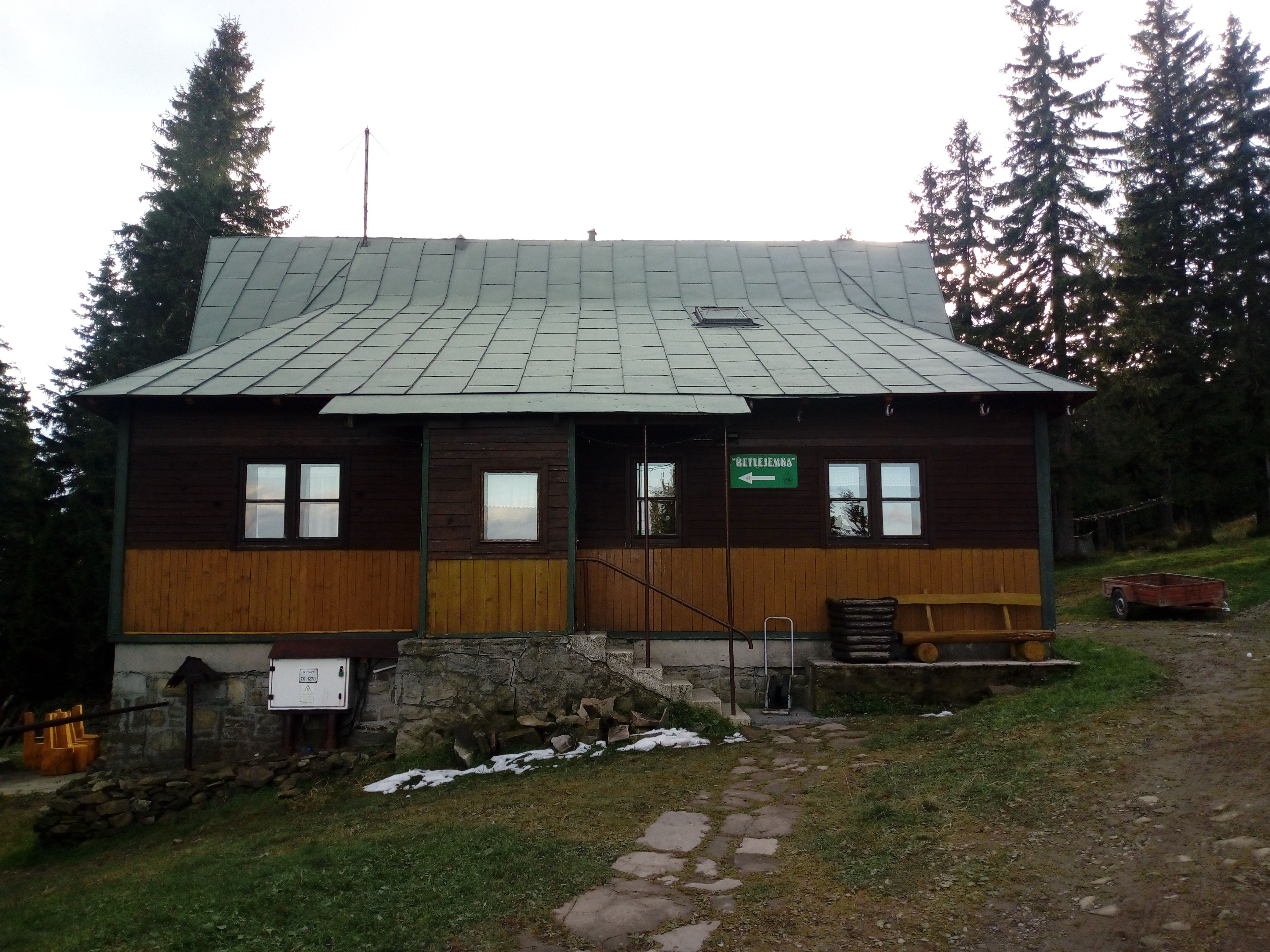 Jest to jeden z kilku budynków górskiego schroniska określany mianem "Betlejemka". Mieszczą się w nim pokoje na użytek klientów schroniska.